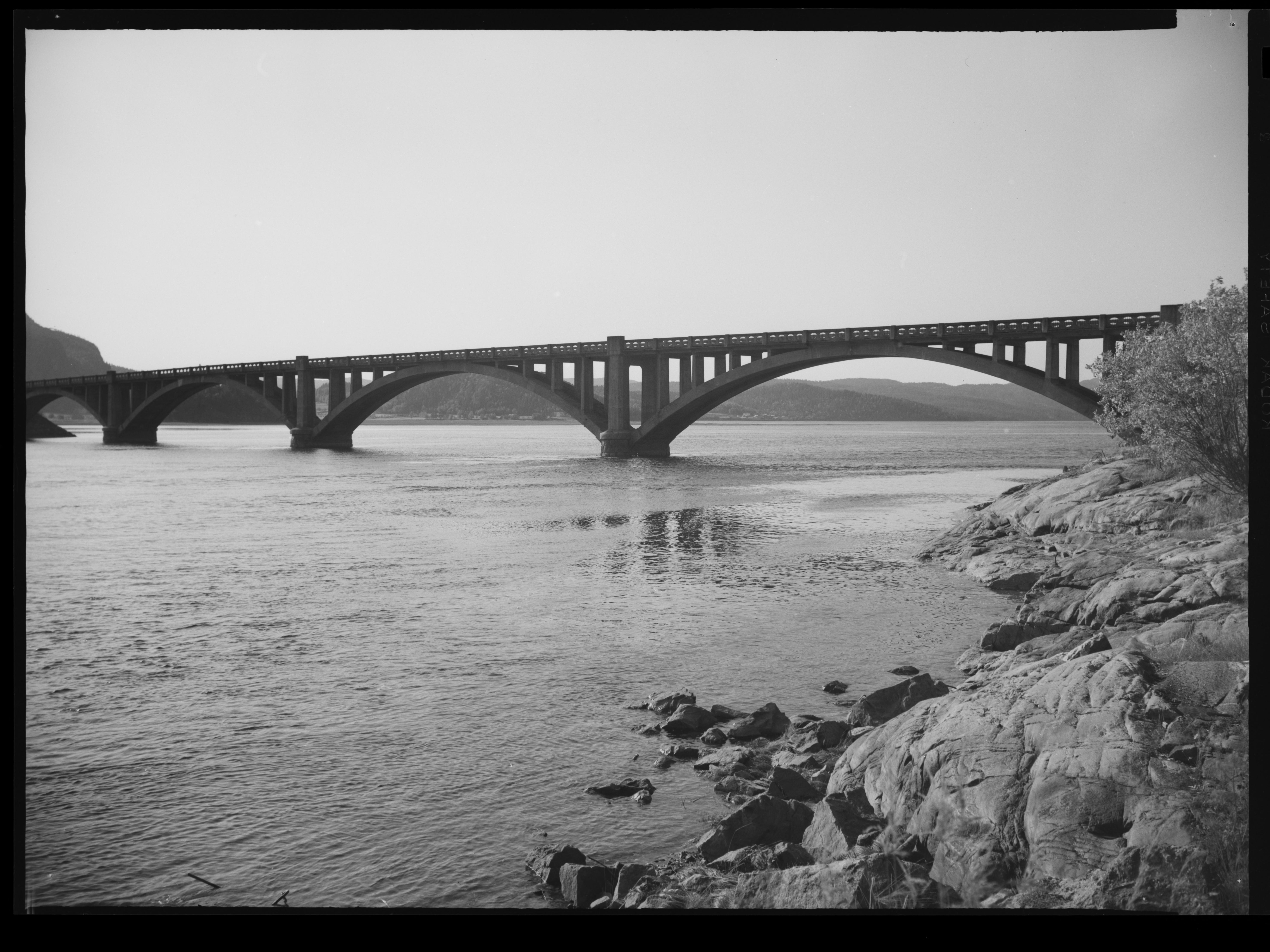 Bildet er hentet fra Nasjonalbibliotekets bildesamling. Anmerkninger til bildet var: Fotograf: LS Namsen,Namsos, Namsos, Nord Trøndelag